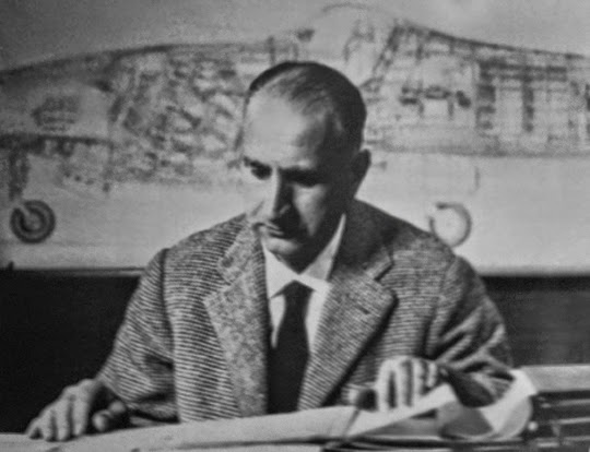 Ing. Sergio Stefanutti